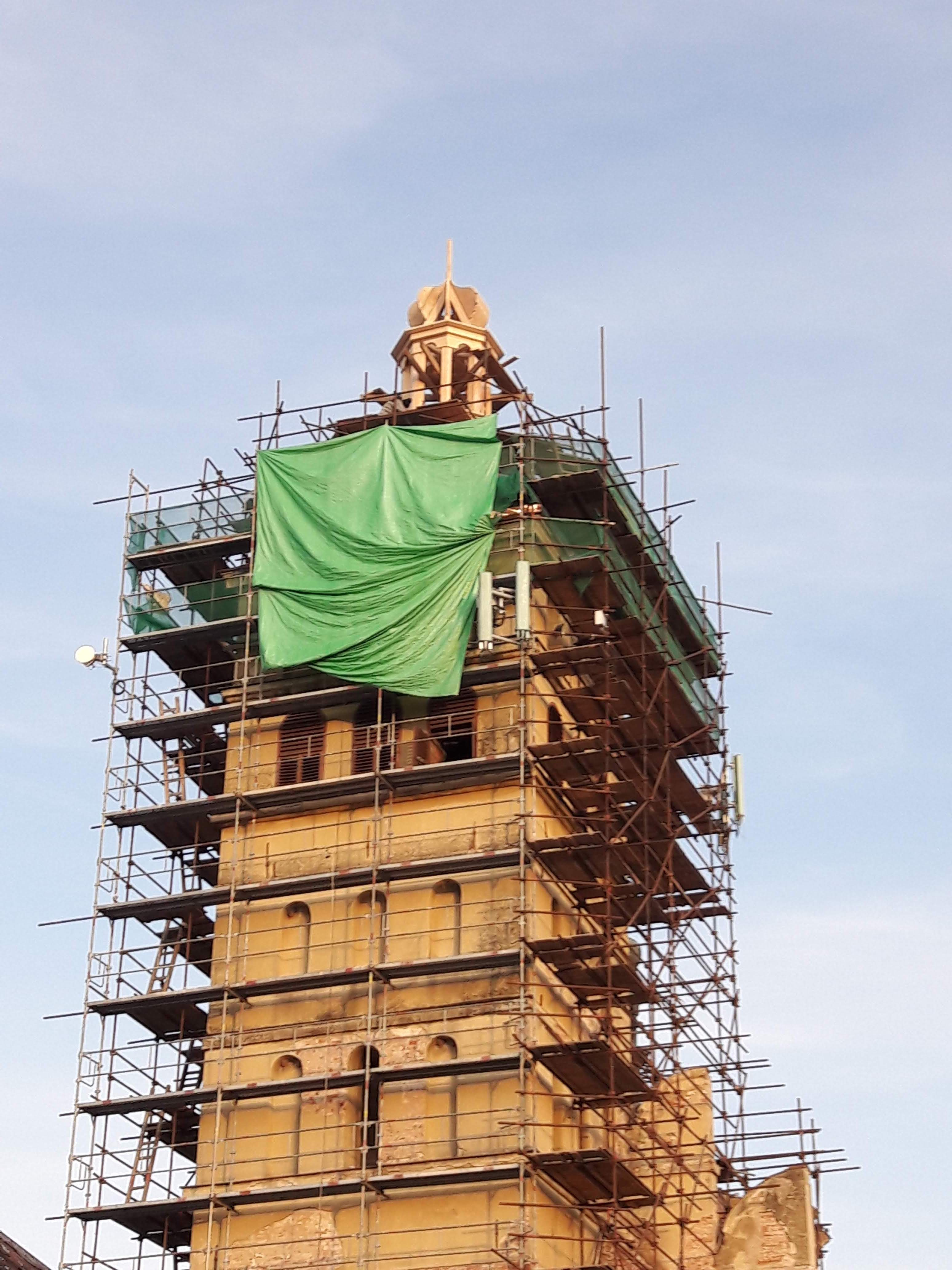 Chlumec nad Cidlinou, věž kostela sv. Voršily, rekonstrukce 2019.